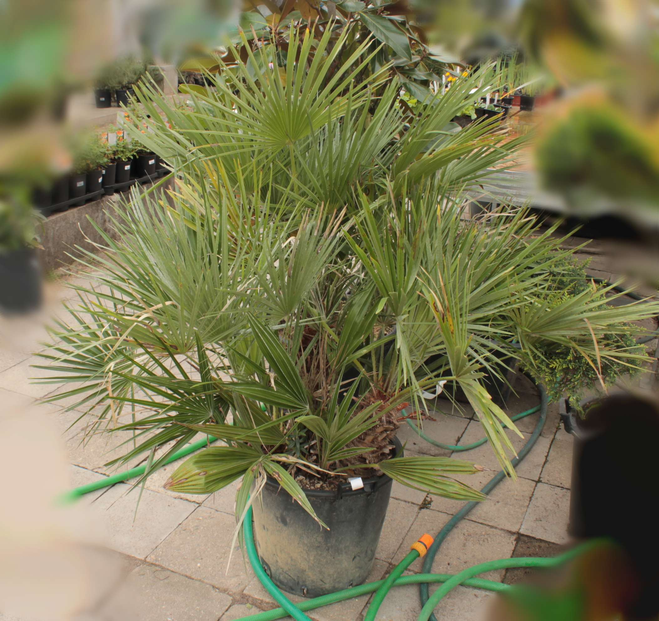 Chamaerops humilis